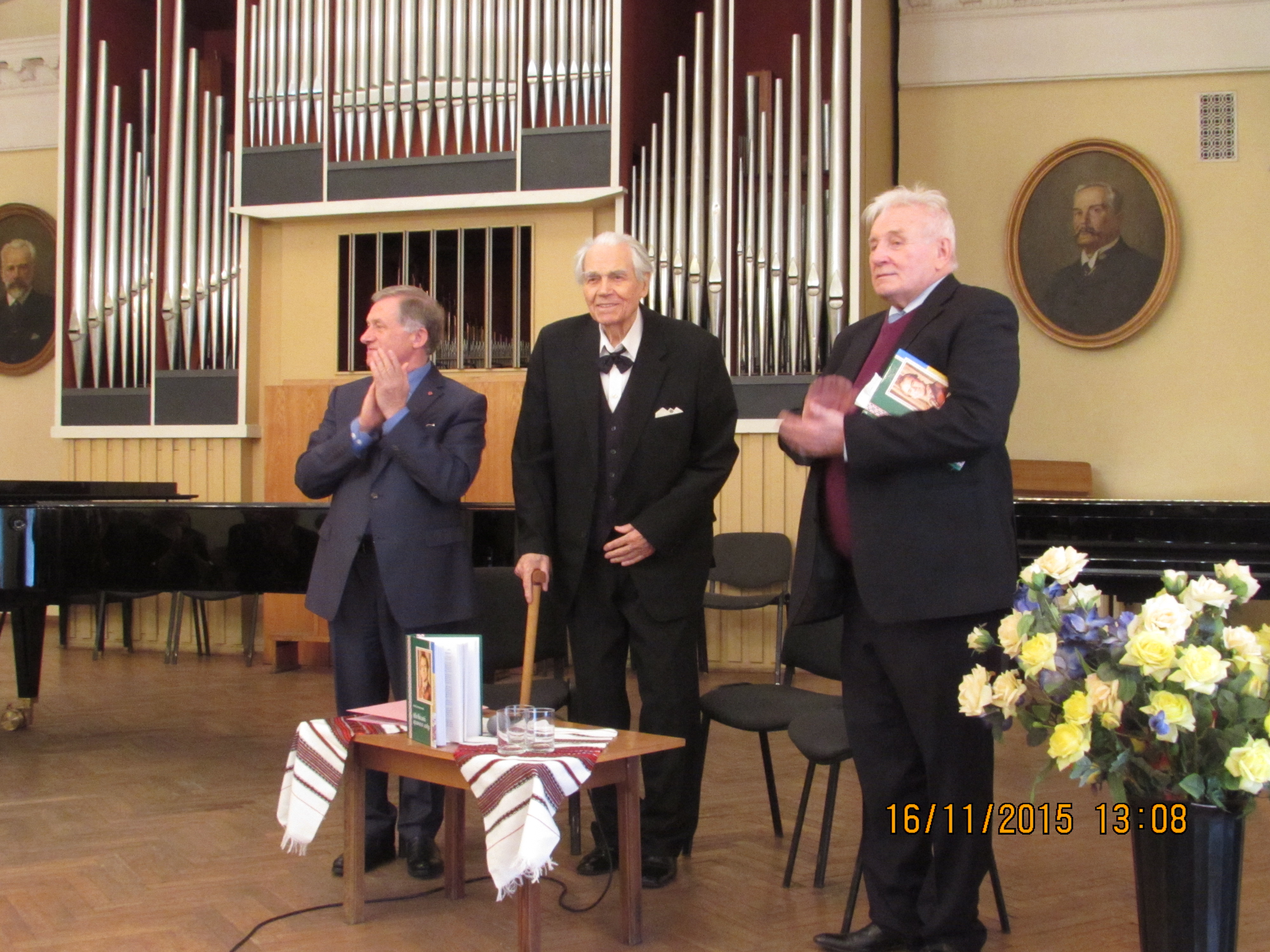 Мала зала Національної музичної академії. Презентація книги Василя Фольварочного «На висотах орлиного лету» про видатного Маестро Дмитра Гнатюка. На сцені Володимир Рожок, Дмитро Гнатюк, Василь Фольварочний. Київ, 16.11.2015